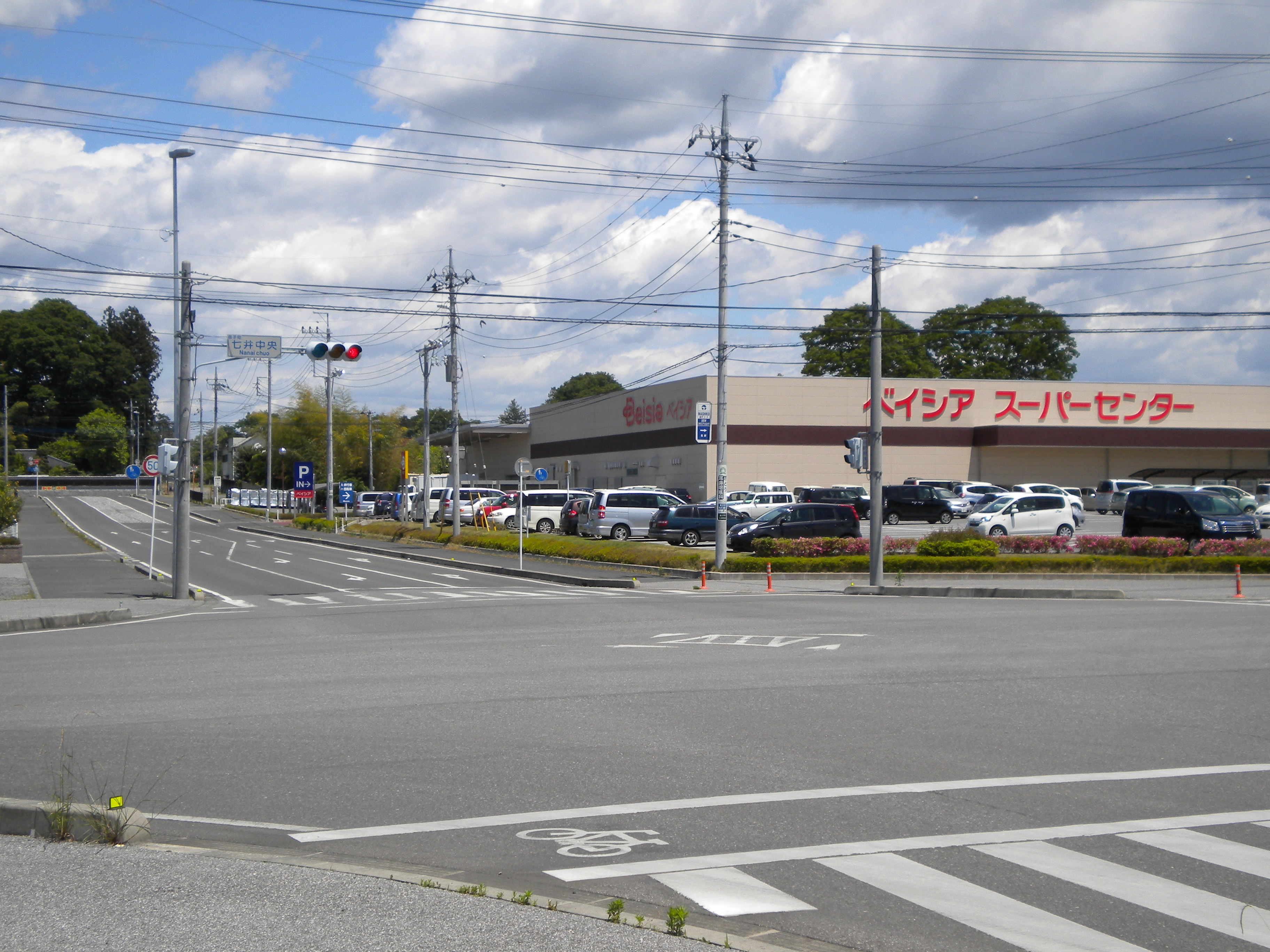 七井中央交差点（国道121・123・294号交点） 栃木県芳賀郡益子町七井中央